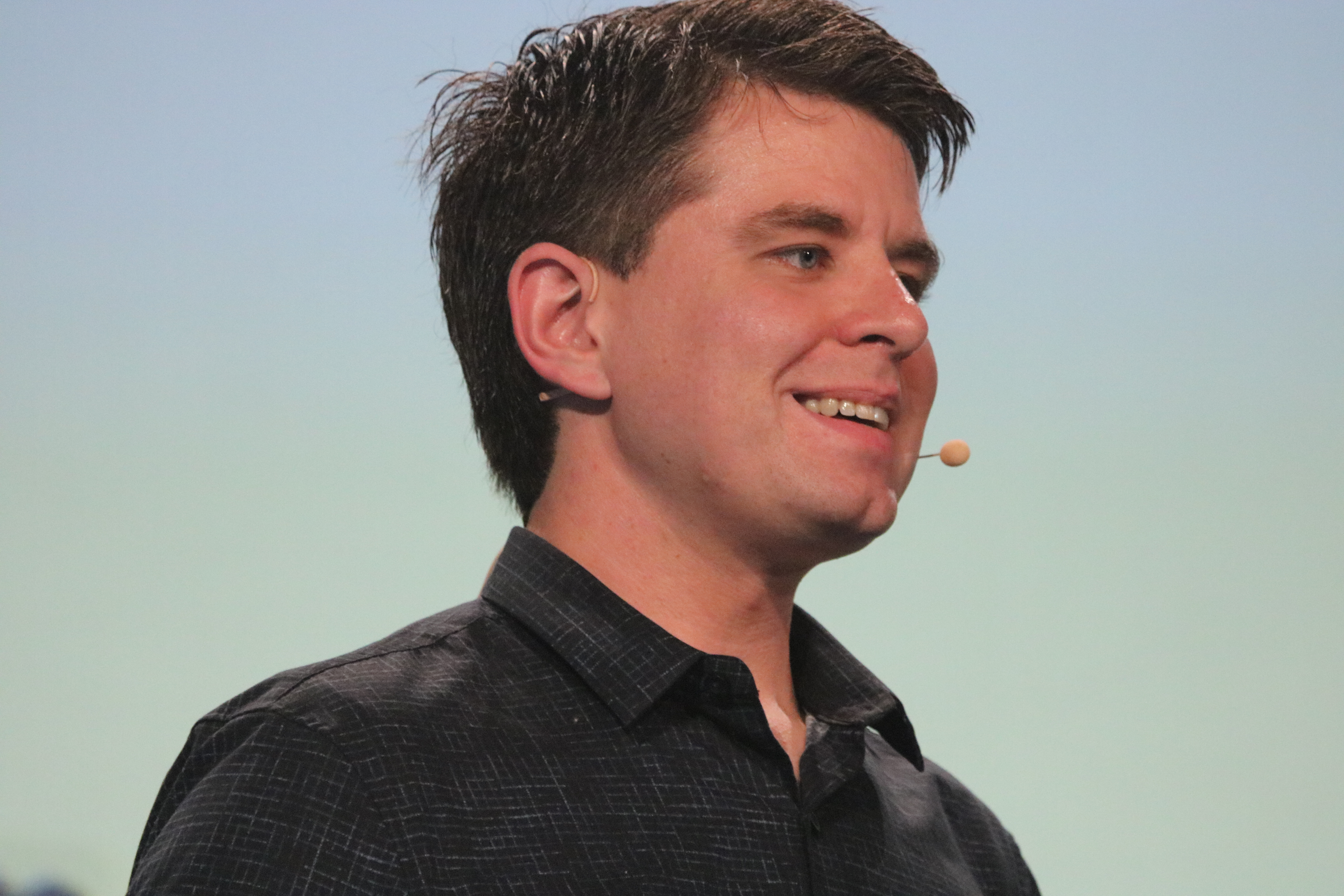 Randall Munroe